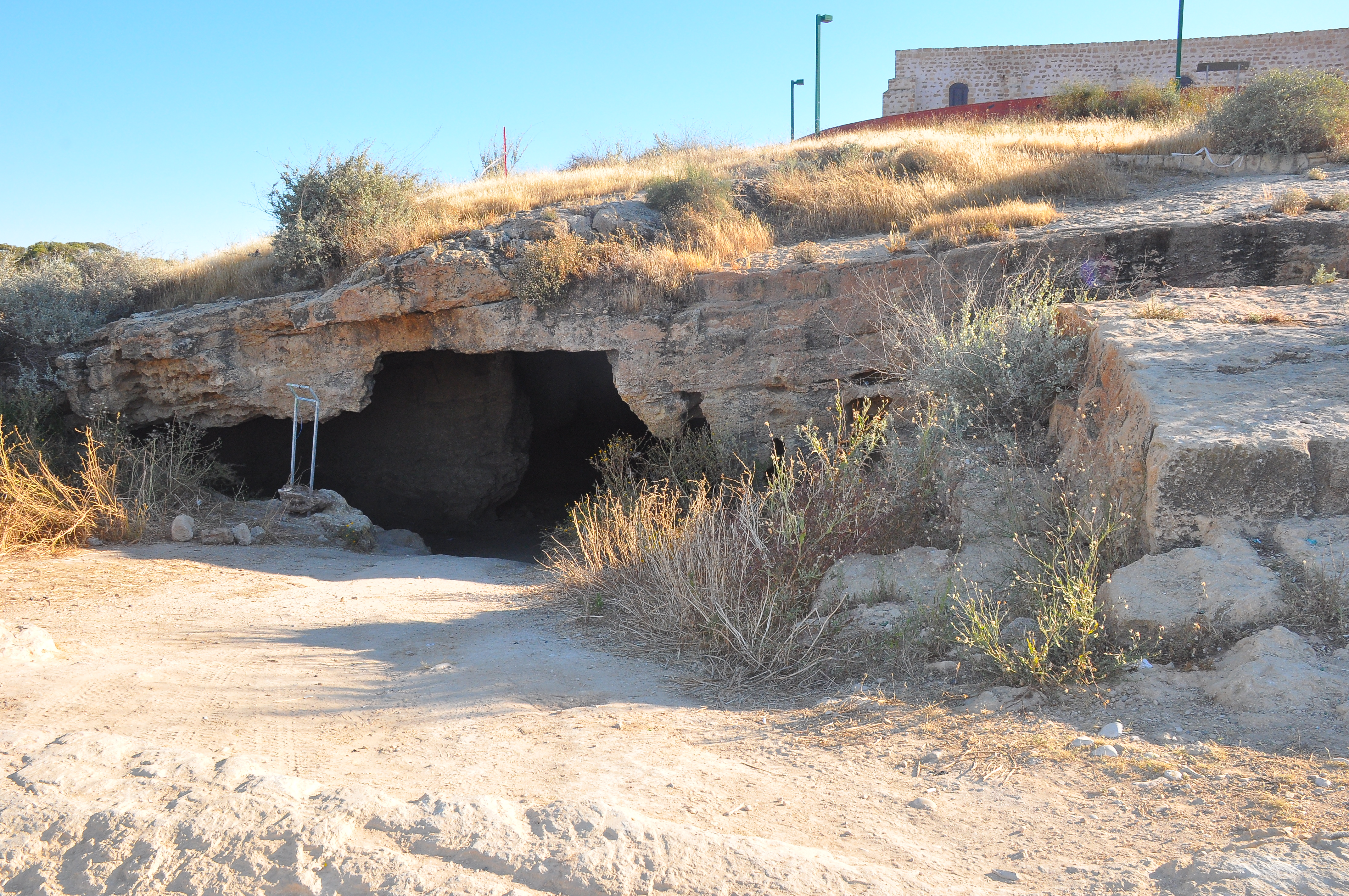 מבצר פטיש 2015